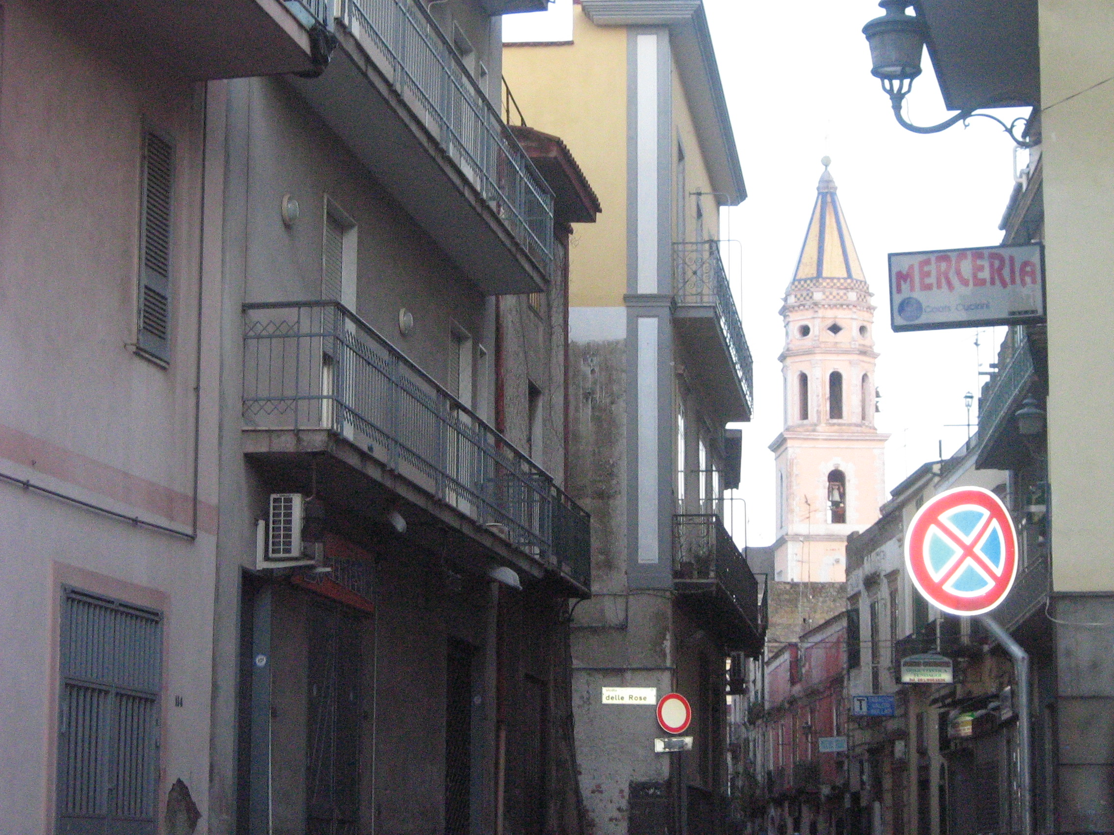 autore: Lusb 11-01-2009